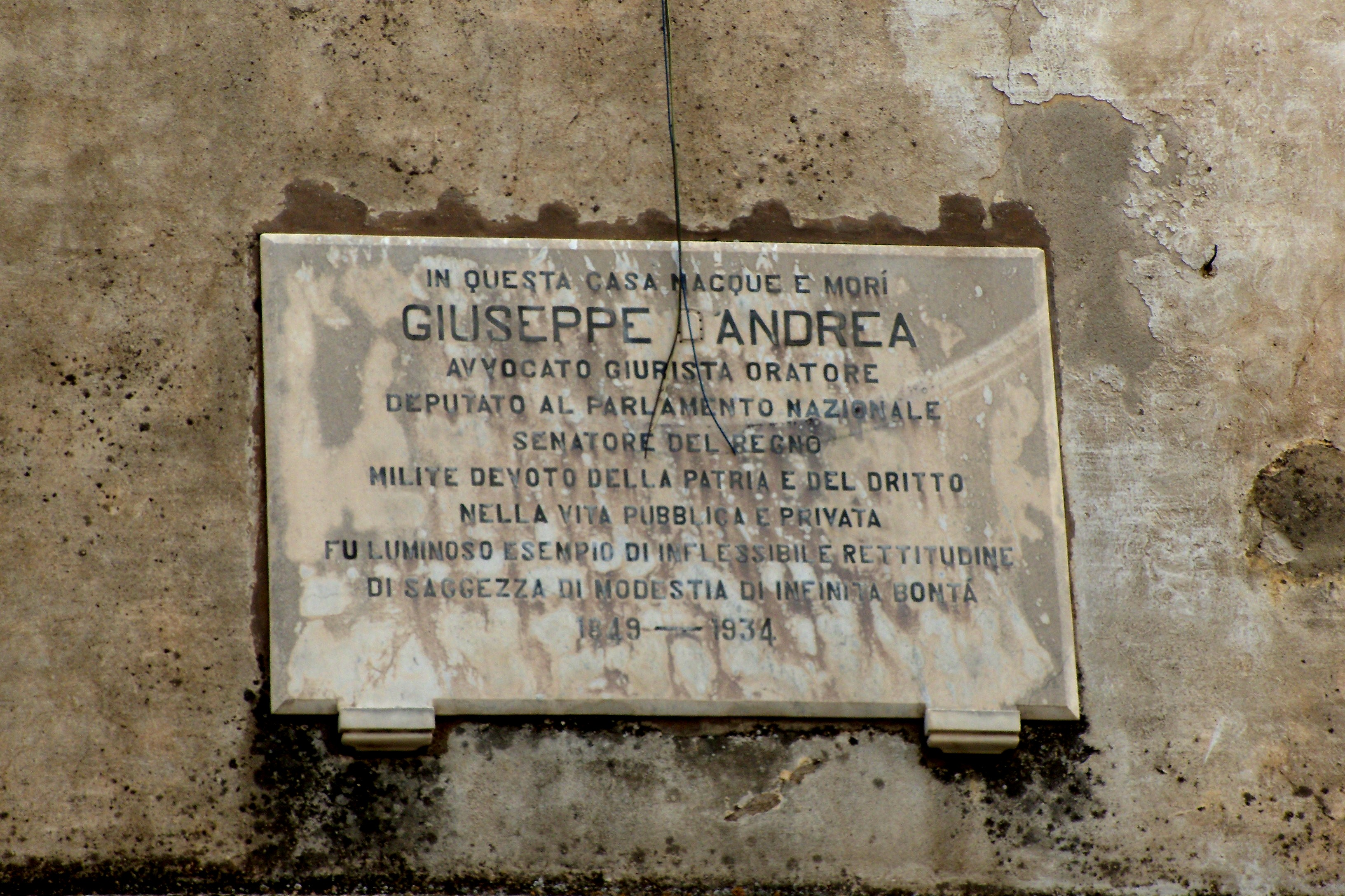 Lapide commemorativa del senatore Giuseppe D'Andrea in Cerreto Sannita (Italy).